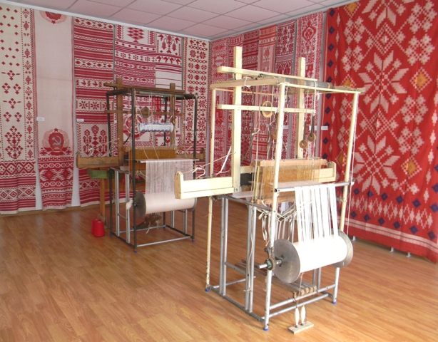 Кролевець. Ткацький станок, експонат мезую